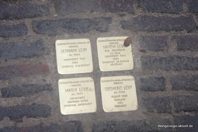 Stolpersteine der Familie Levy auf Wangerooge